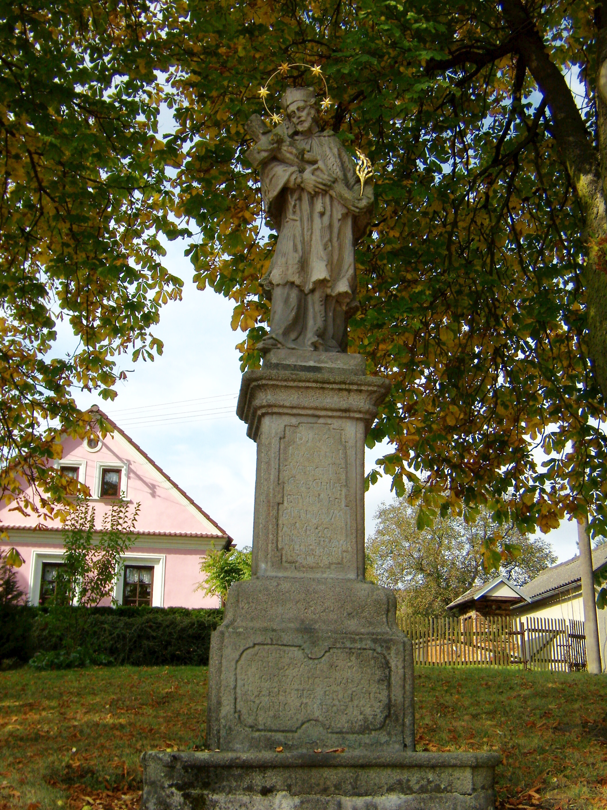 Dožice - svatý Jan Nepomucký